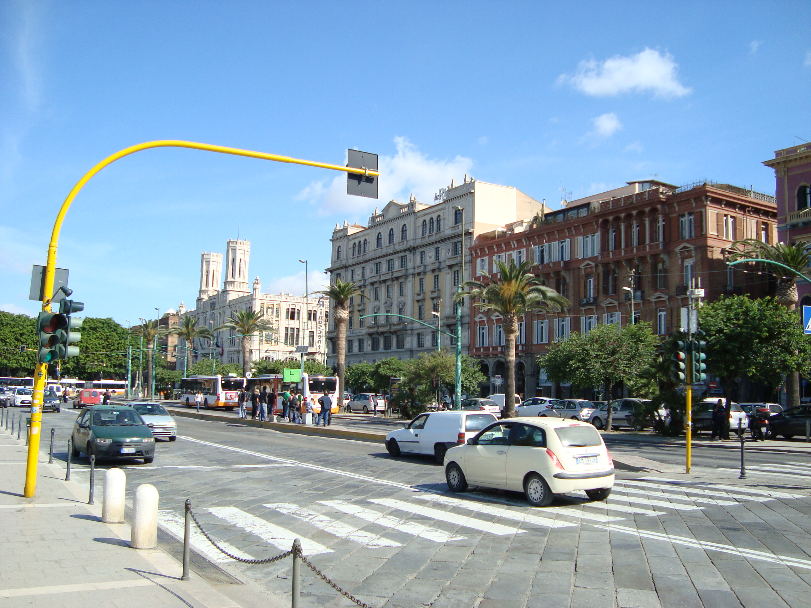 Cagliari